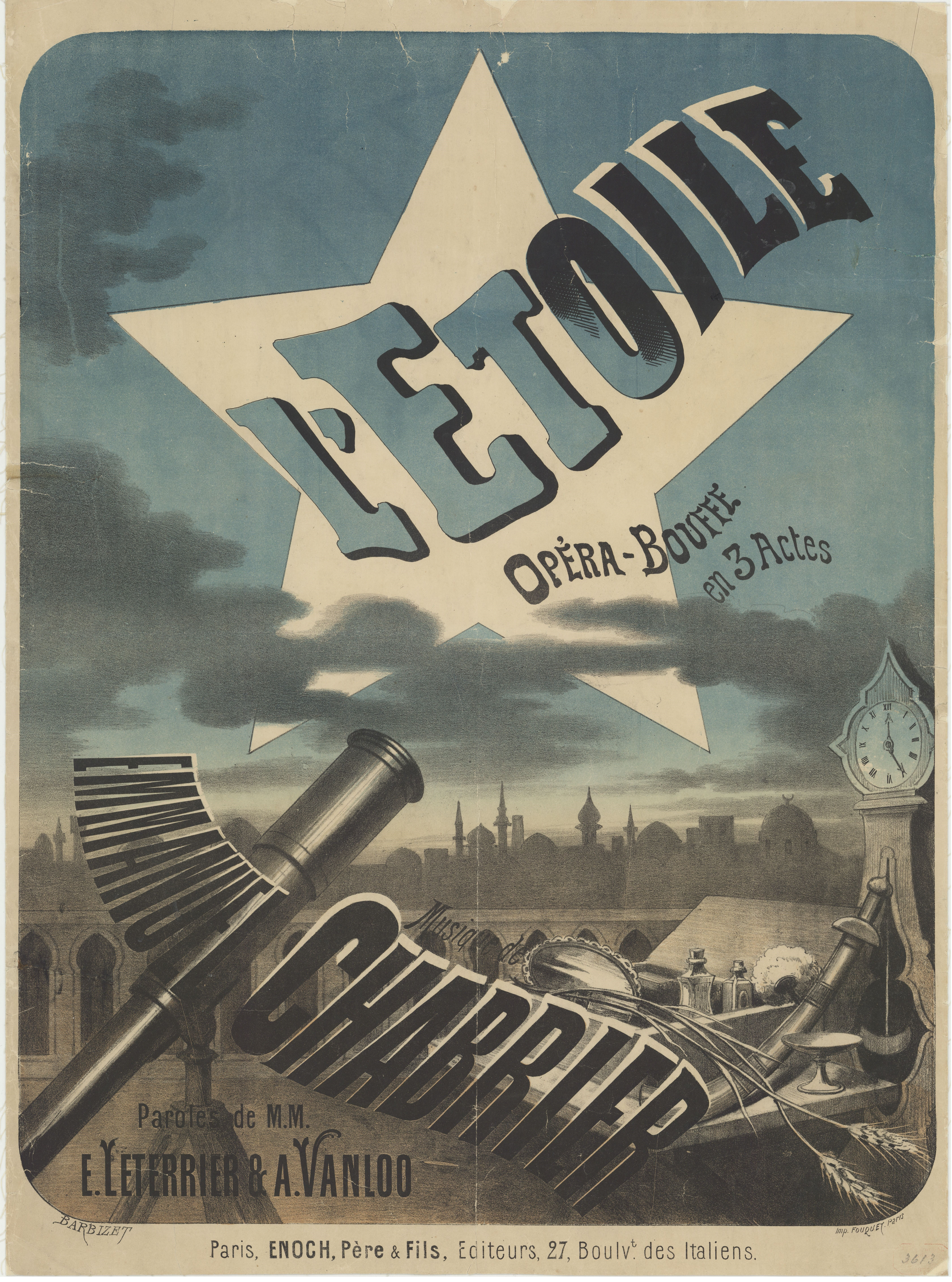 L'Etoile de Chabrier , l'affiche de 1877